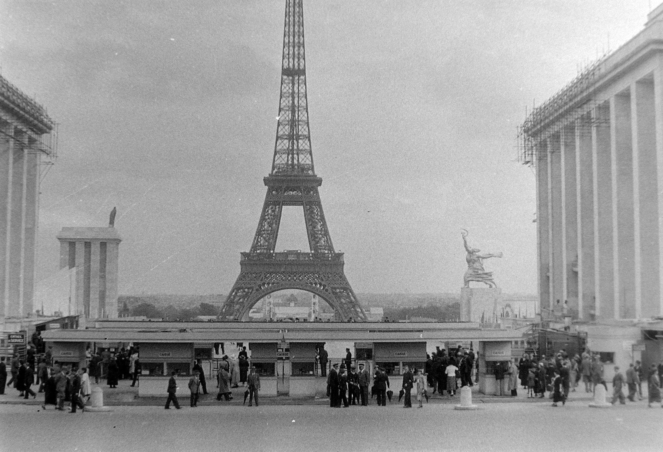 Eiffel-torony, Világkiállítás 1937. Location: France, Paris Tags: international fair, tower Title: Eiffel-torony, Világkiállítás 1937.